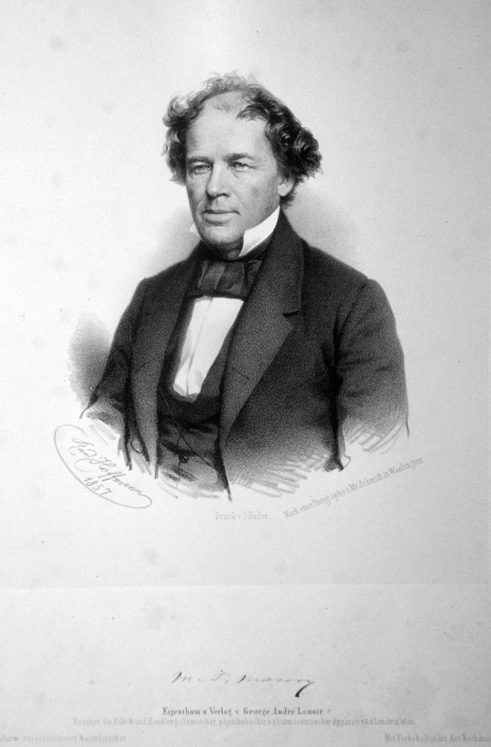 Mathew Fontain Maury, US Hydrograph. Lithographie von Rudolf Hoffmann, 1857. Nach einer Fotografie von Mr. Smith, Washington